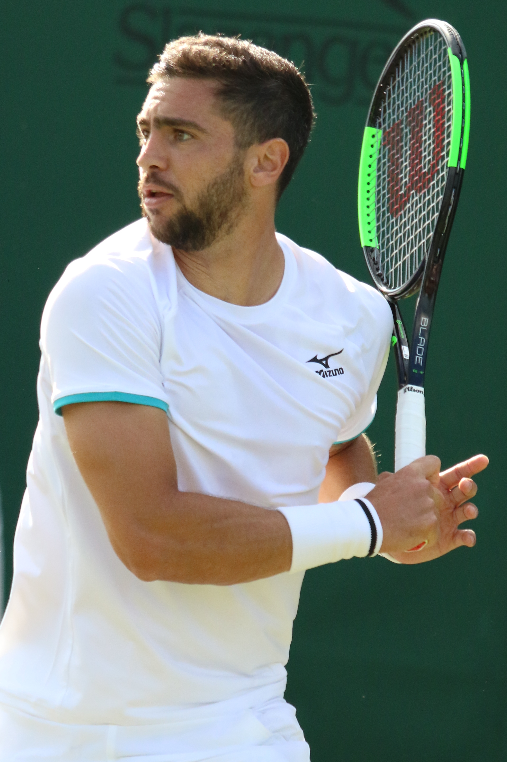 Andreozzi WM19 (19)